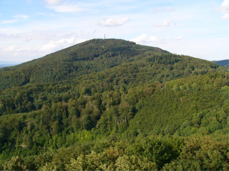 Das Foto zeigt den Melibokus vom Schloss Auerbach her.